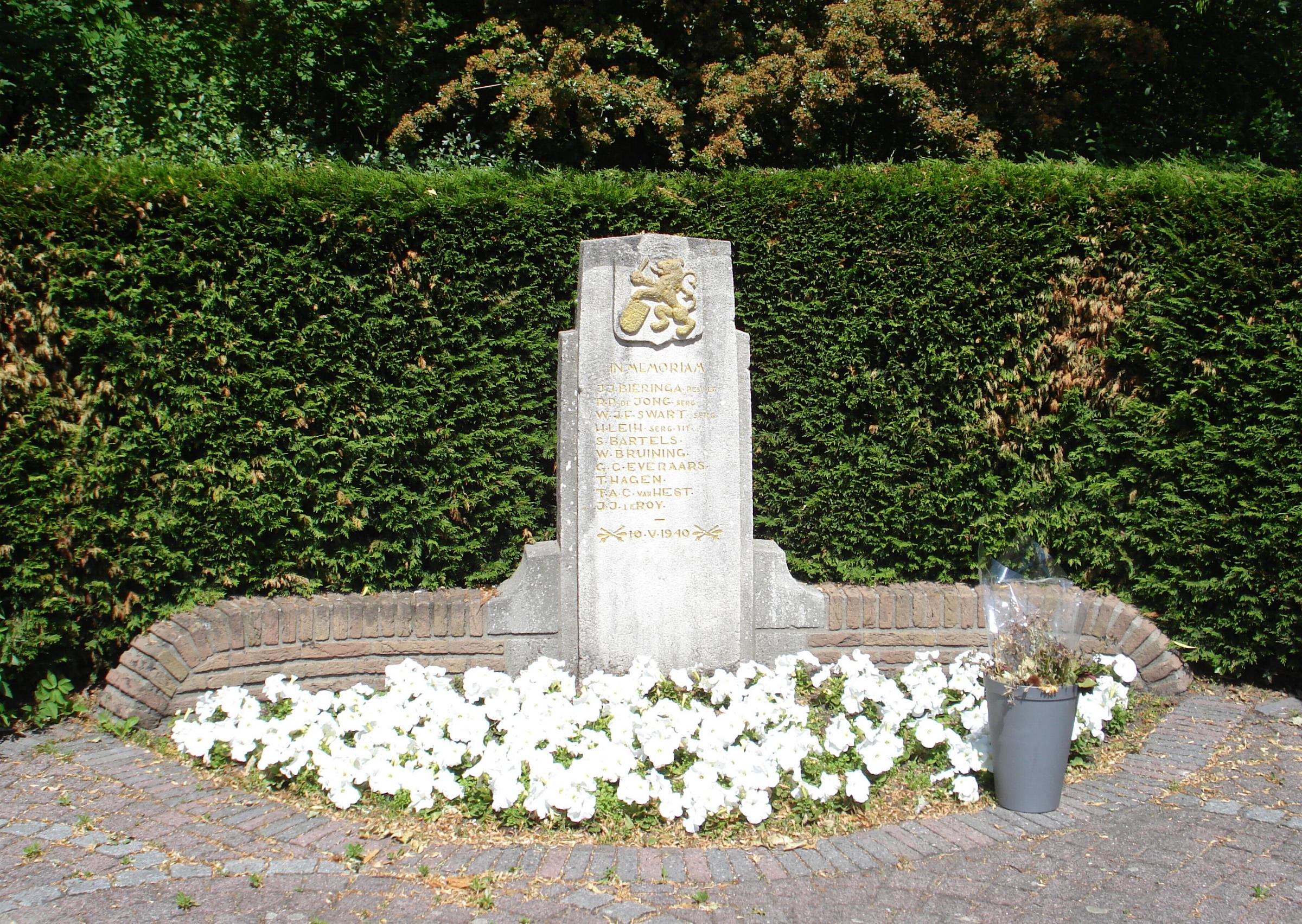 Voorburg, Meidoornlaan. Monument "Leeuwenbergh" van Prof. ir. J.A. Lucas (ontwerp), Marian Gobius (uitvoering). Voorburg/The Netherlands. FOP.